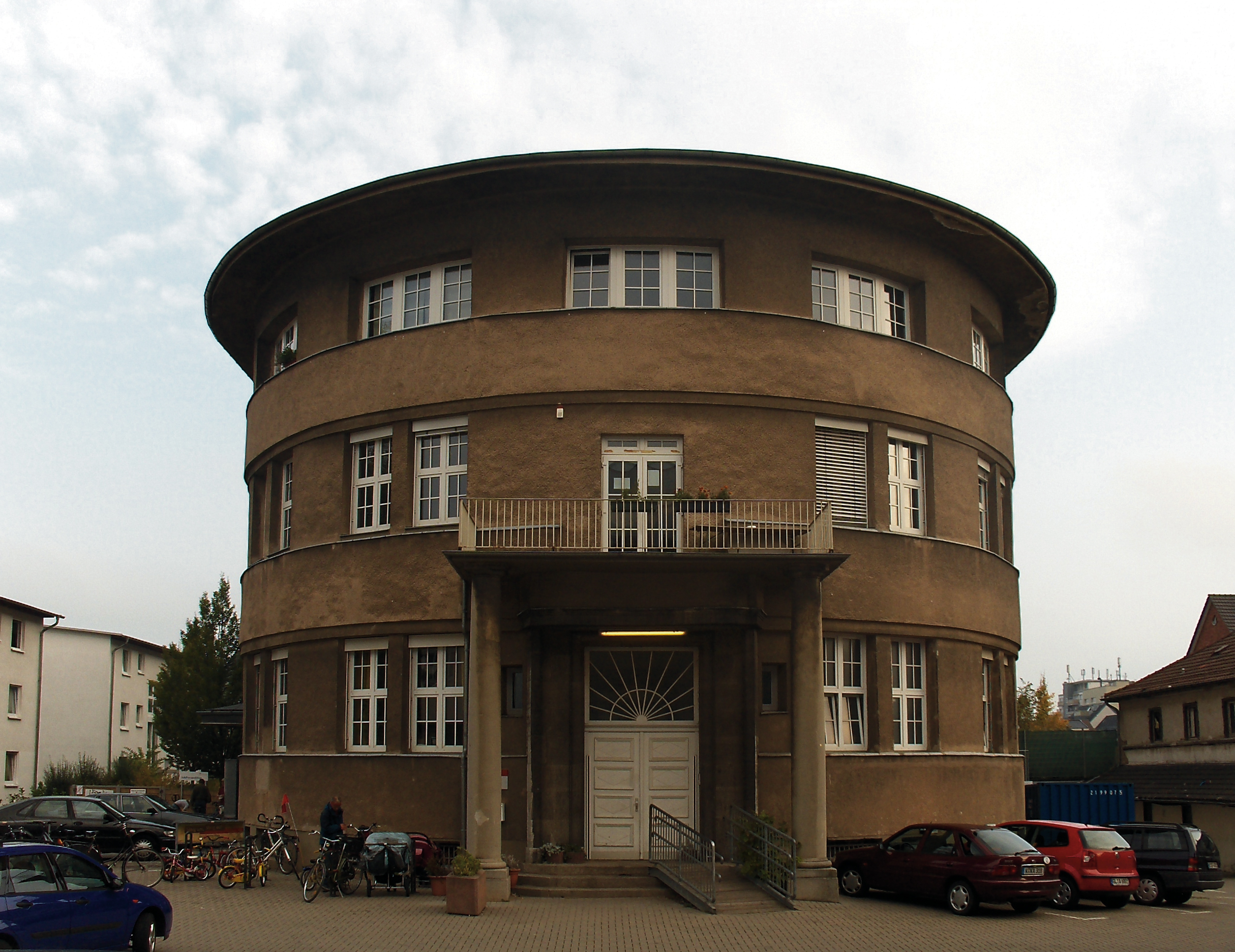 Haupteingang des denkmalgeschützten Opekta-hauses in Köln